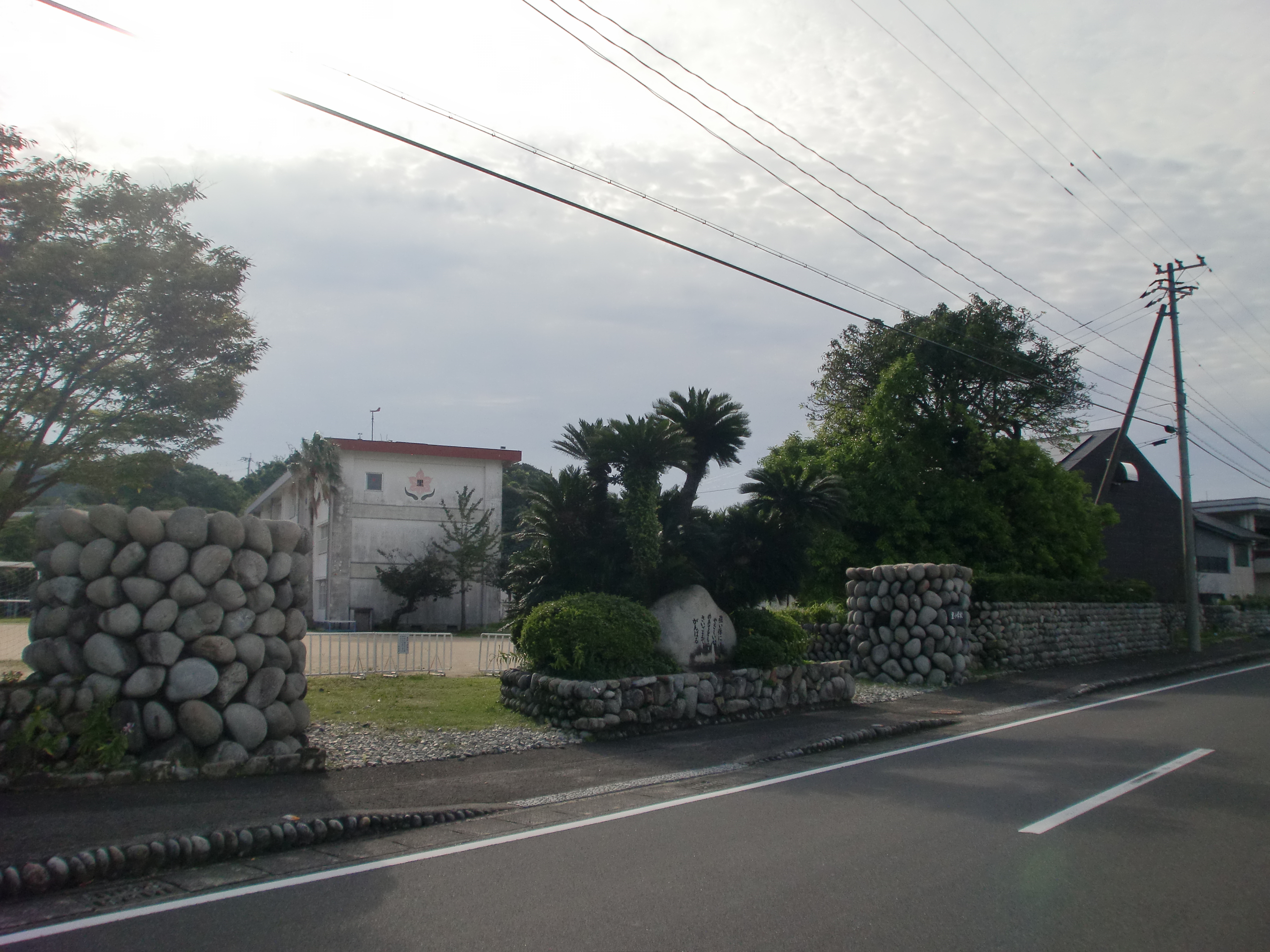 薩摩川内市立里小学校の外観。